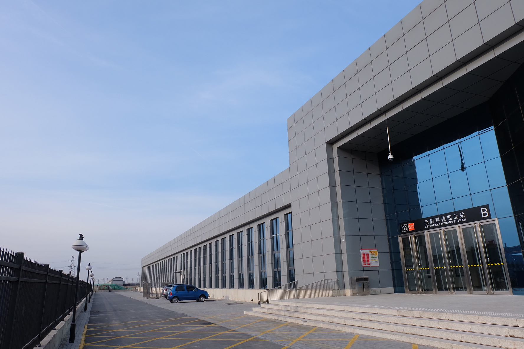 天津地铁北辰科技园北站B出入口